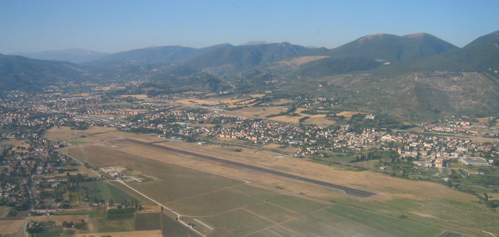 Pista aeroporto Foligno